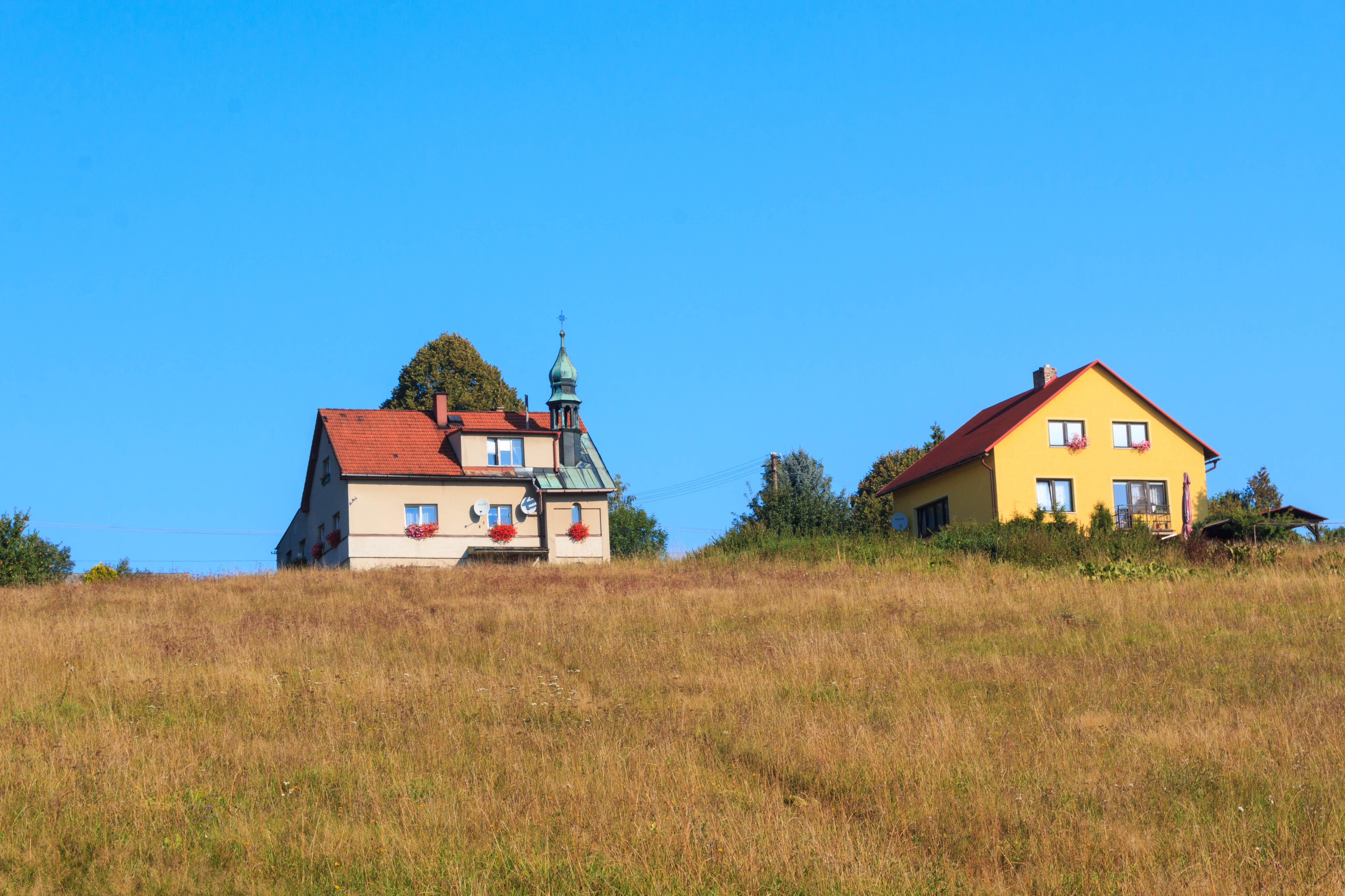 Pohoří u Stružince - čp. 21